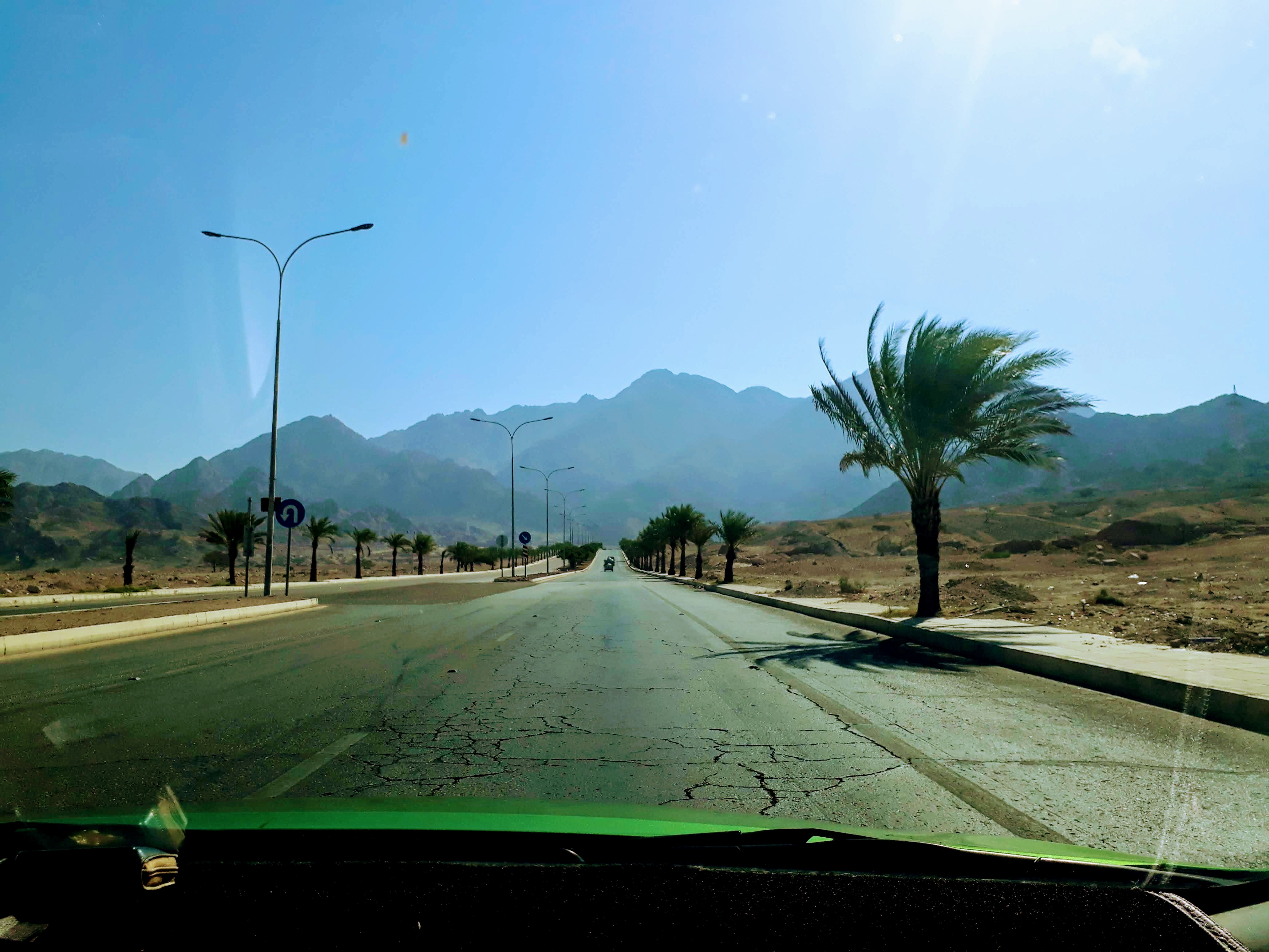 പെട്ര നഗരം സ്ഥിതിചെയ്യുന്ന മലനിരകളുടെ ഒരു ദൂരകാഴ്ച !